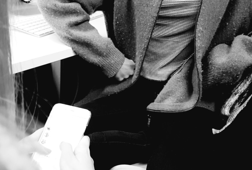 Representació gràfica del Phubbing